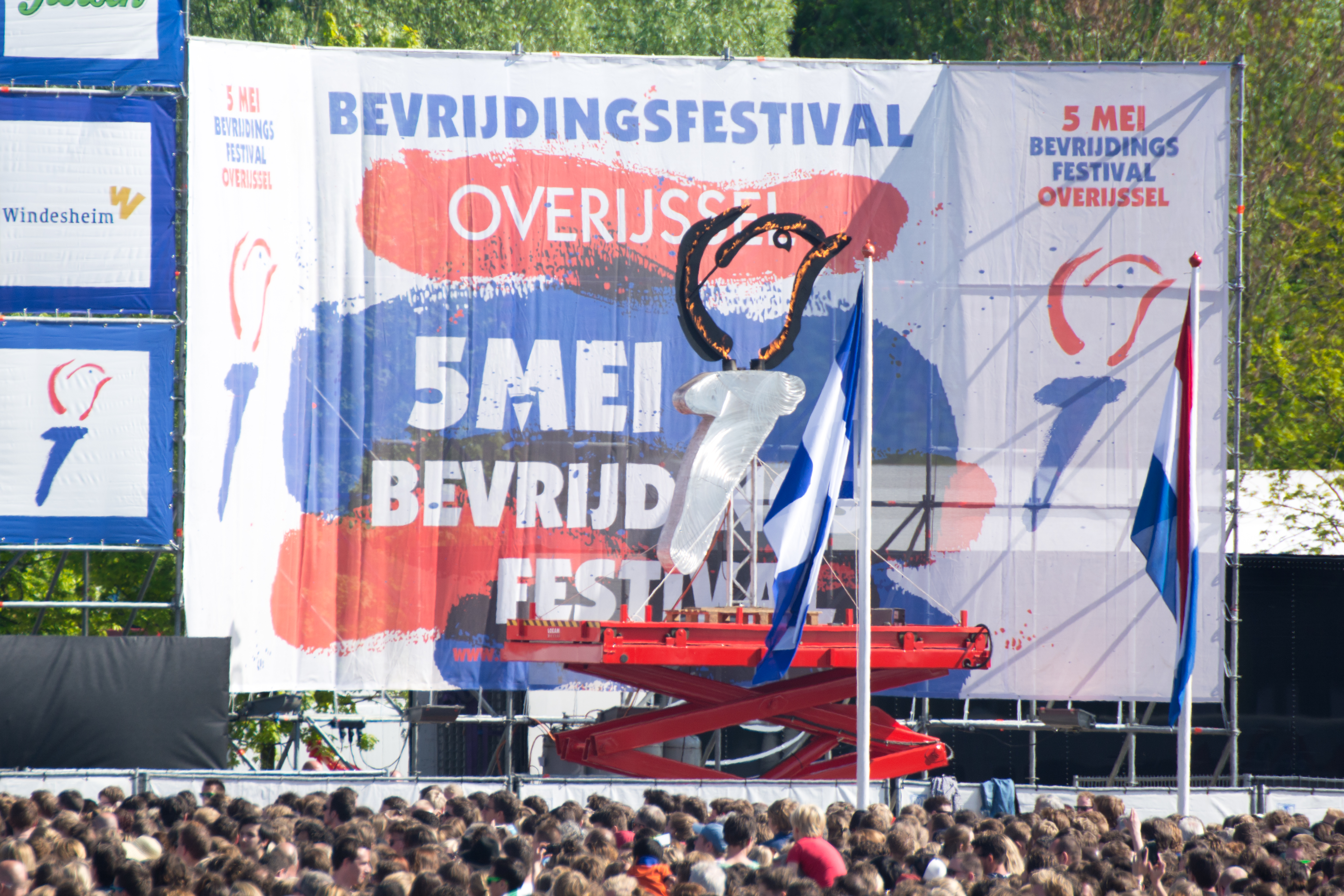 Het bevrijdingsvuur is een nationaal Nederlands symbool ter herdenking van het einde van de Tweede Wereldoorlog op 5 mei 1945. Gemaakt in Zwolle als onderdeel van het nationale bevrijdingsfestival waar men in 2014 op 14 bevrijdingsfestival het bevrijdingsvuur heeft ontstoken.